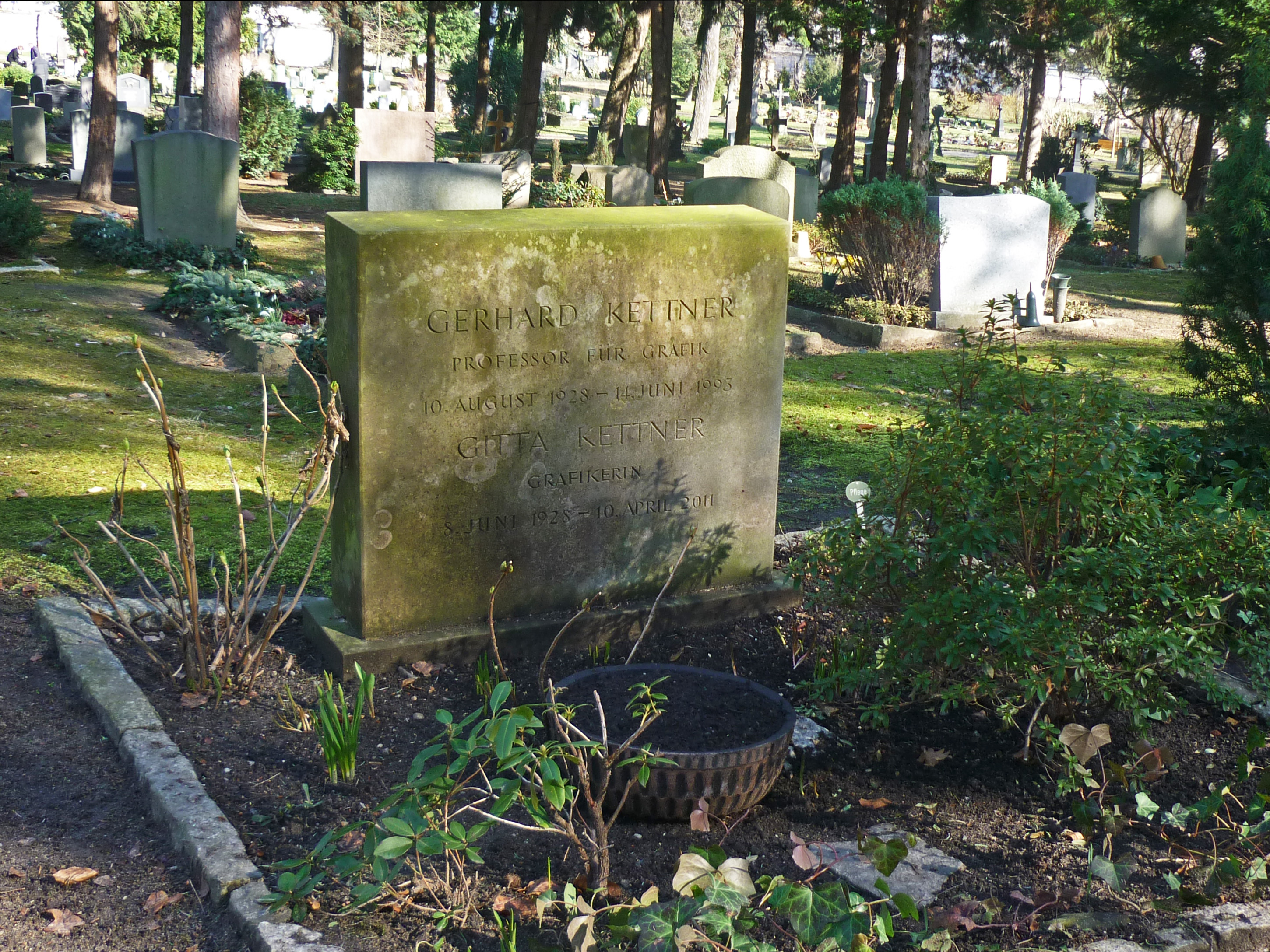 Grab des Graphikers Gerhard Kettner (1928–1993) auf dem Trinitatisfriedhof in Dresden